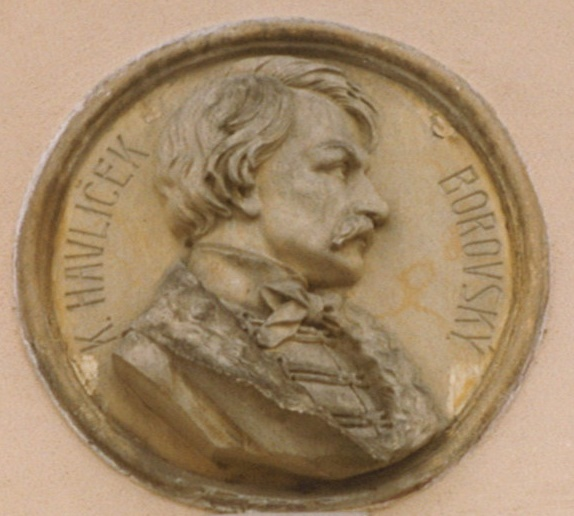 Velké náměstí 109, Velké náměstí 109/55, Kroměříž pamětní deska Karla Havlíčka Borovského od Jan Becka.